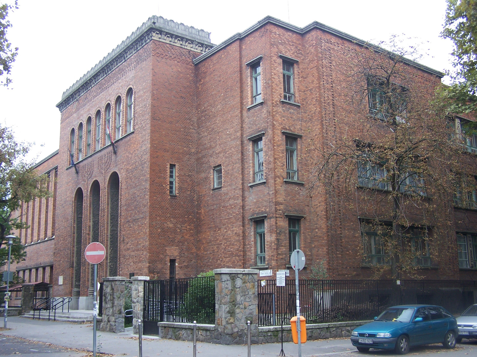 Iskola (Budapest 14, Cházár András utca 10., Abonyi Lajos utca 7.) This is a photo of a monument in Hungary. Identifier: 1221